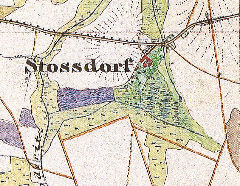 Stoßdorf, 1962/3 devastierter Ort, Ortsteil Egsdorf, Stadt Luckau, Landkreis Dahme-Spreewald, Brandenburg, Ausschnitt aus dem Urmesstischblatt 4148 Luckau von 1847